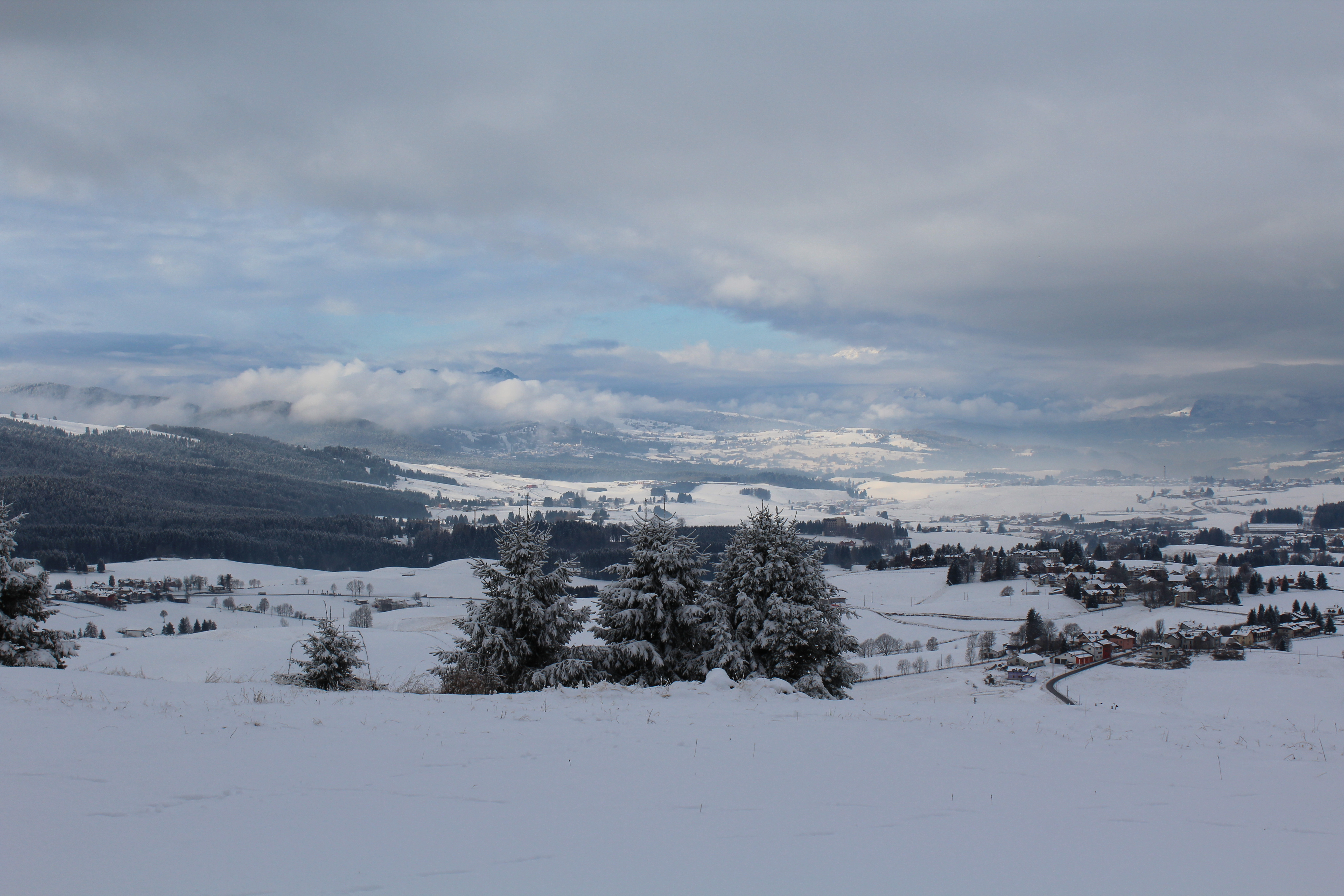 La conca di Asiago vista dal Monte sisemol dopo una nevicata